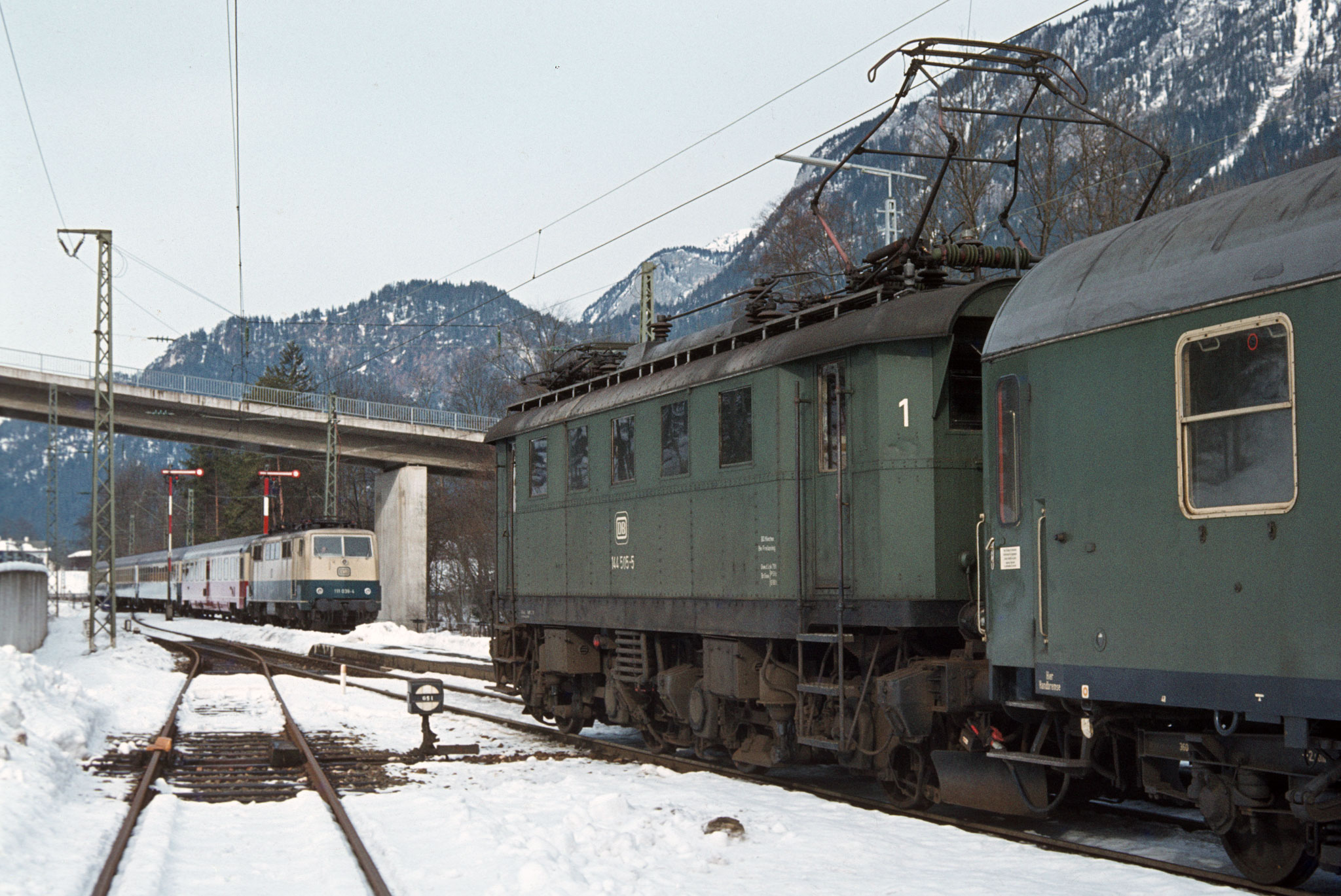 Zugkreuzung im Bahnhof Bischofswiesen am 02.02.1980. Der mit der 144 505 bespannte Nahverkehrszug N 5511 wartet die Einfahrt des Nahverkehrszuges des aus IC-Wagen gebildeten Nahverkehrszuges ab, der die Gegenleistung zum Intercity 511 Berchtesgaden - Köln bildet.